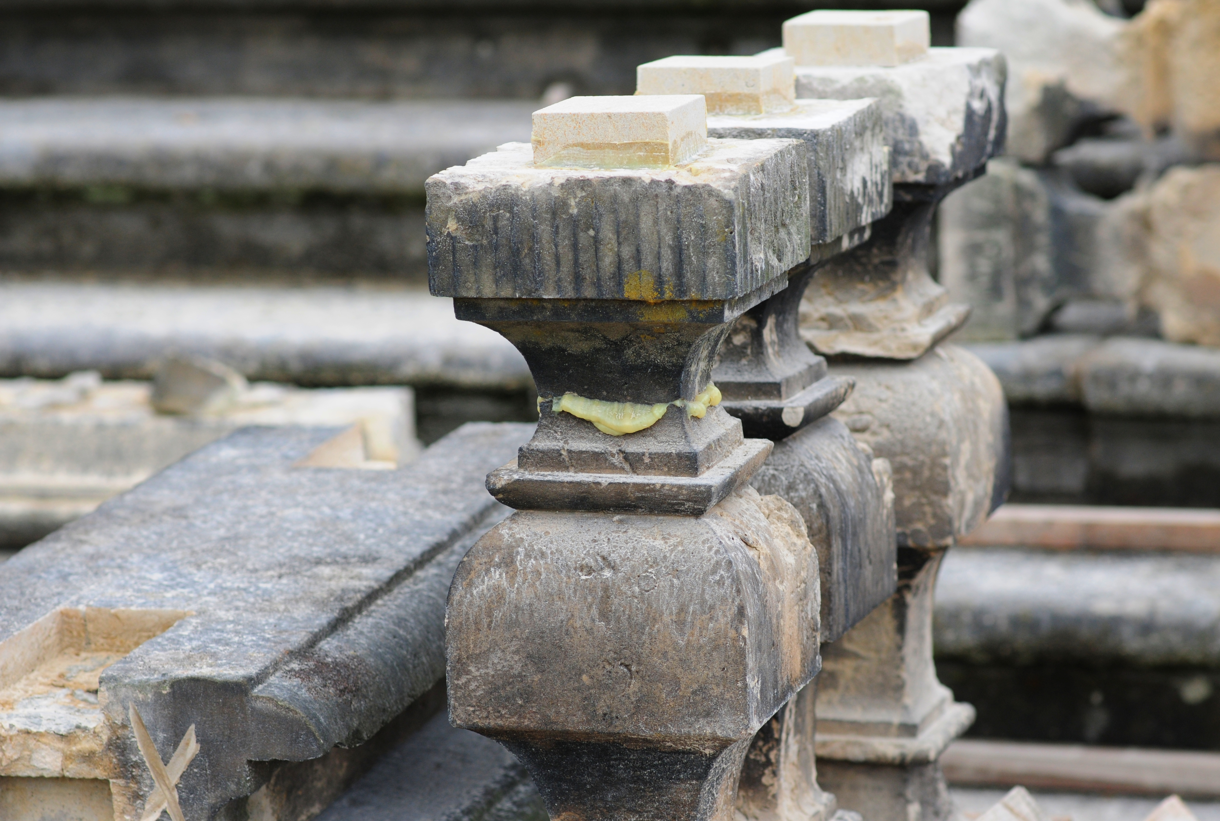 Restaurierungs- und Konservierungsmaßnahmen am Elbsandstein, Verklebungen mit Epoxidharz (unfertige Bearbeitung)